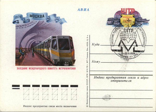 Почтовая карточка СССР - Заседание международного комитета метрополитенов. На карточке - поезд типа И 1 серии.